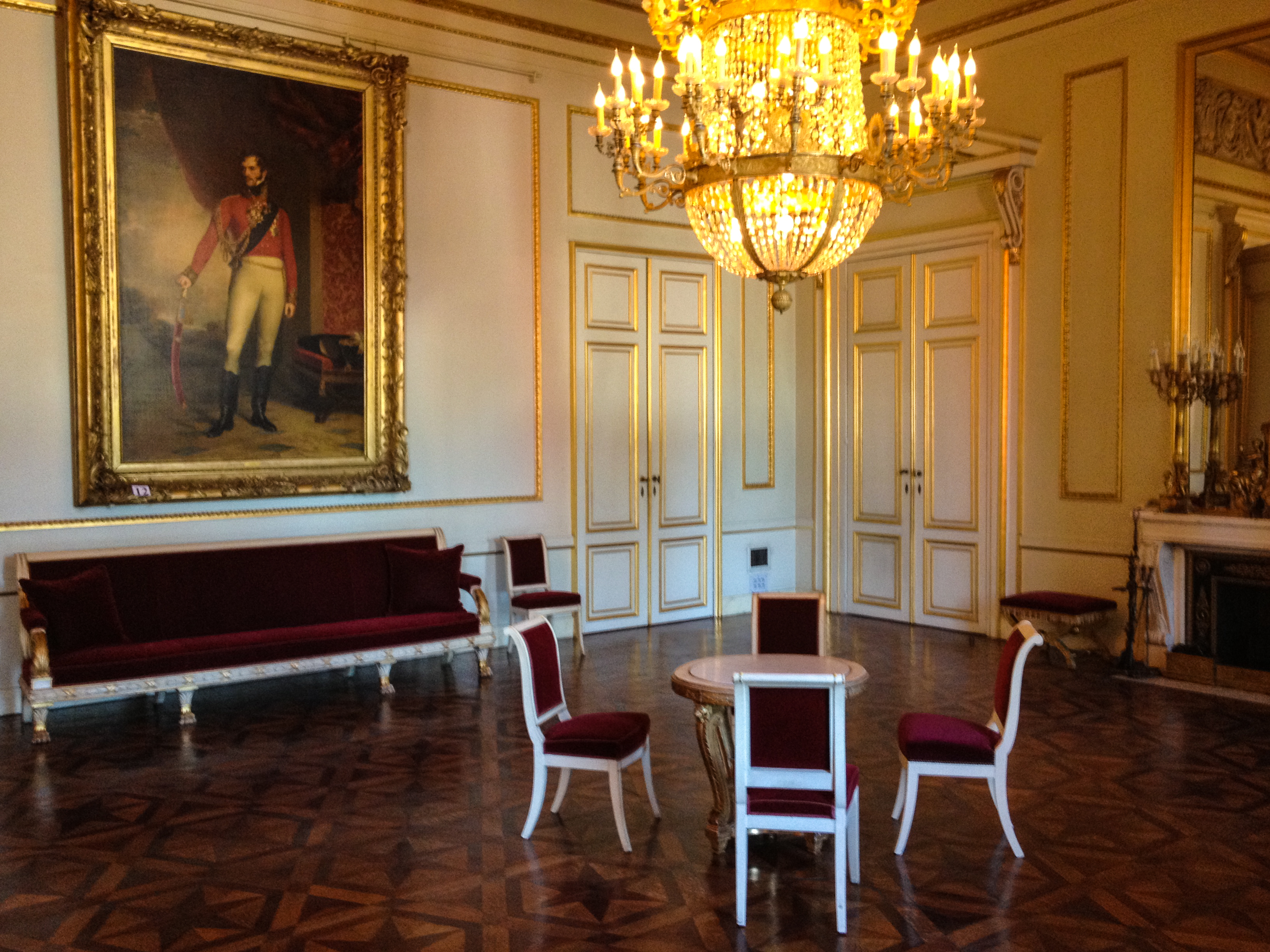 The Royal Palace of Brussels (Dutch: Koninklijk Paleis van Brussel